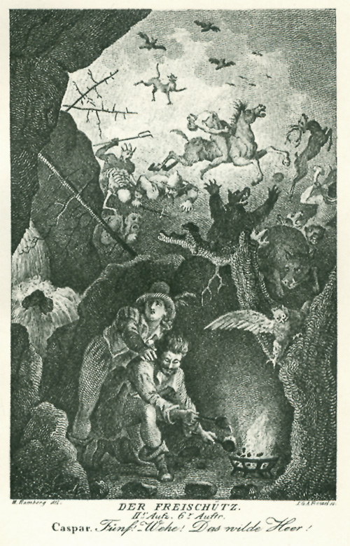 Illustration zur Oper "Der Freischütz" von Carl Maria von Weber, Akt II, 6. Auftritt. Dargestellt sind Caspar und Max beim Gießen von Freikugeln. Es erscheint das "wilde Heer".